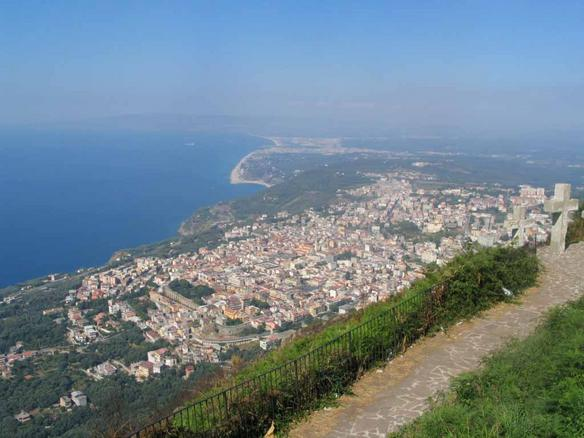 Vista della Piana di Gioia Tauro da Monte Sant'Elia, con veduta di Palmi e Gioia Tauro